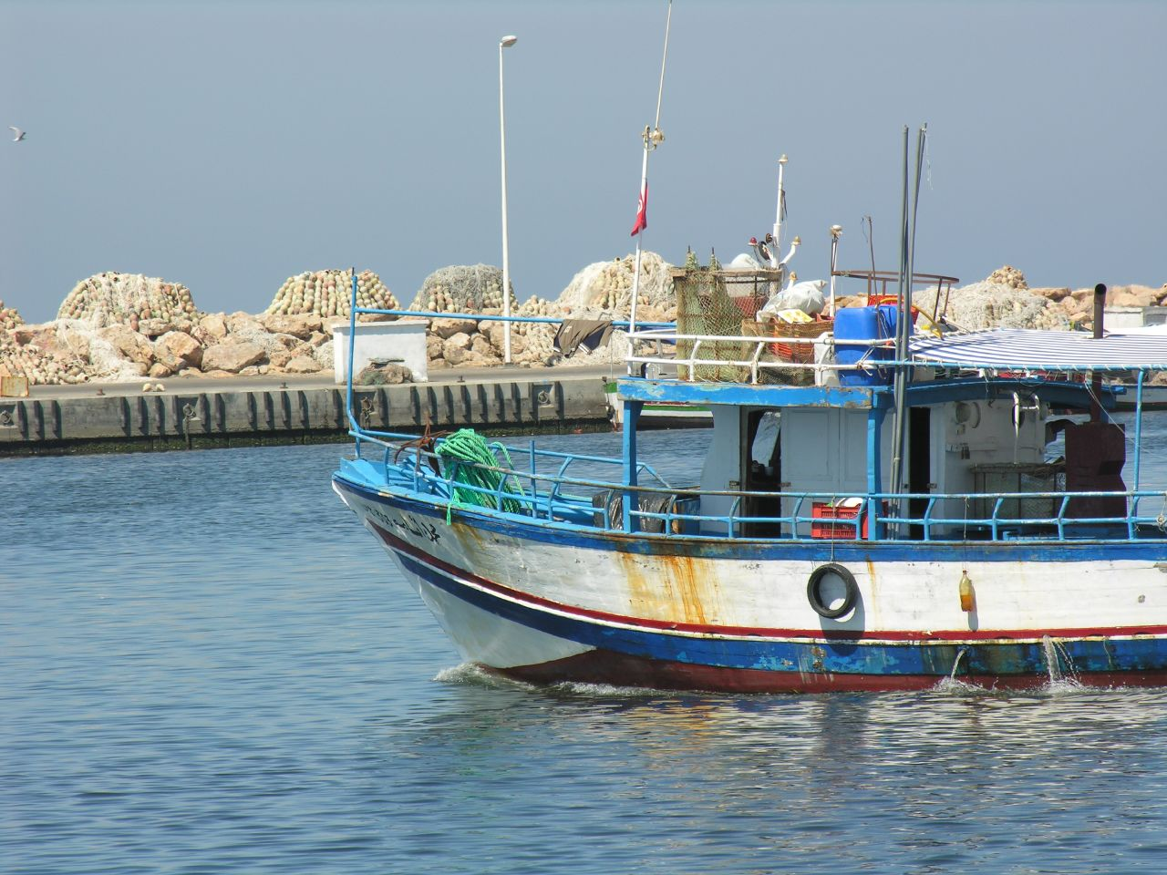 Port de Houmt Souk Djerba Tunisie